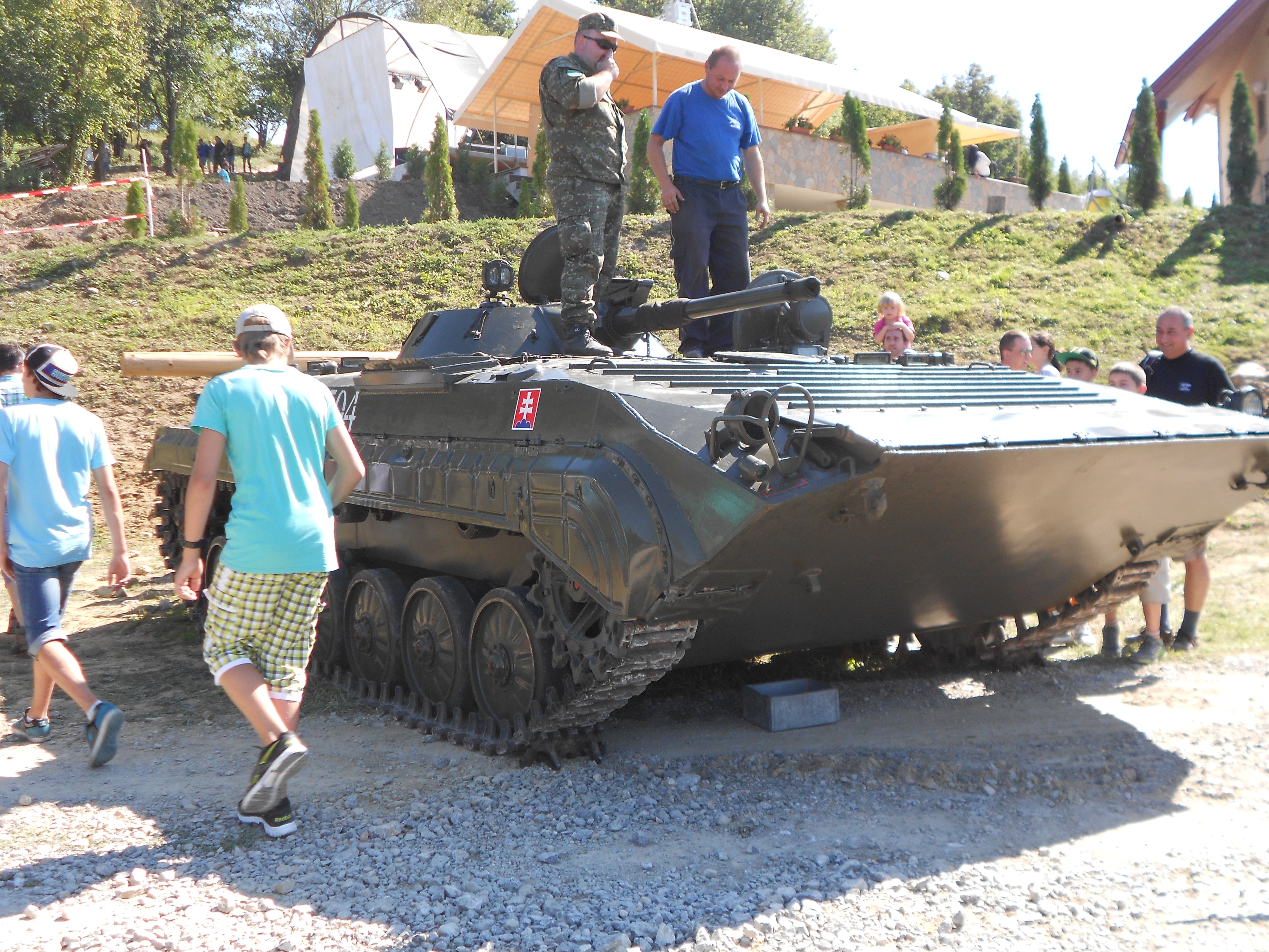 BVP-1 na rekonštrukcii bojov Prvé Boje SNP 2013 v Nezbudskej Lúčke